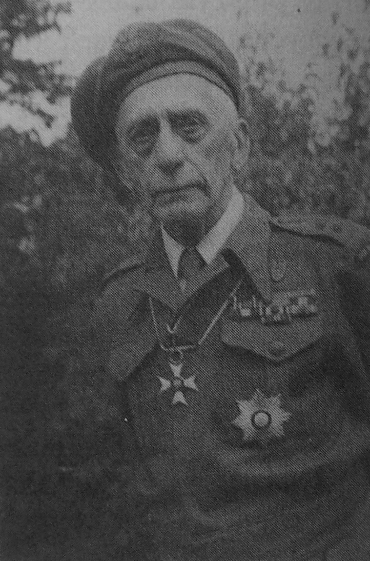 Władysław Zaleski